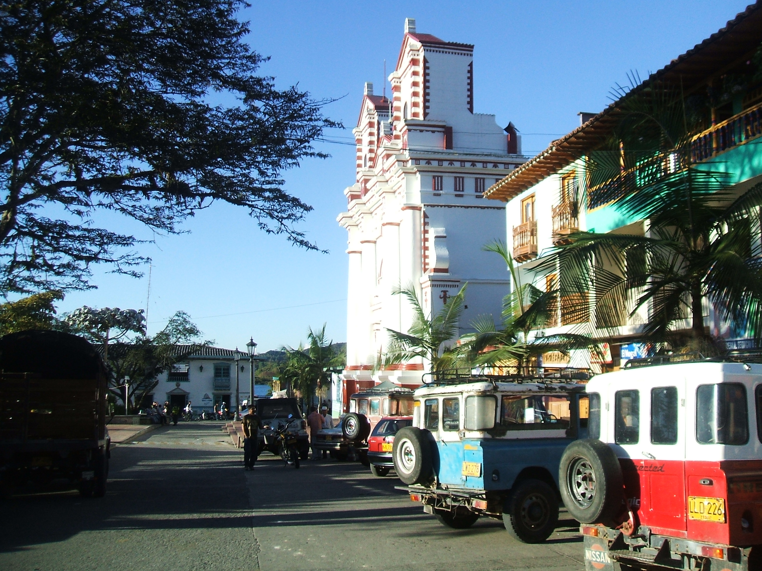 Gàidhlig: Sealladh air a' Cheàrnaig ann an Guatape, Antioquia, Colombia.